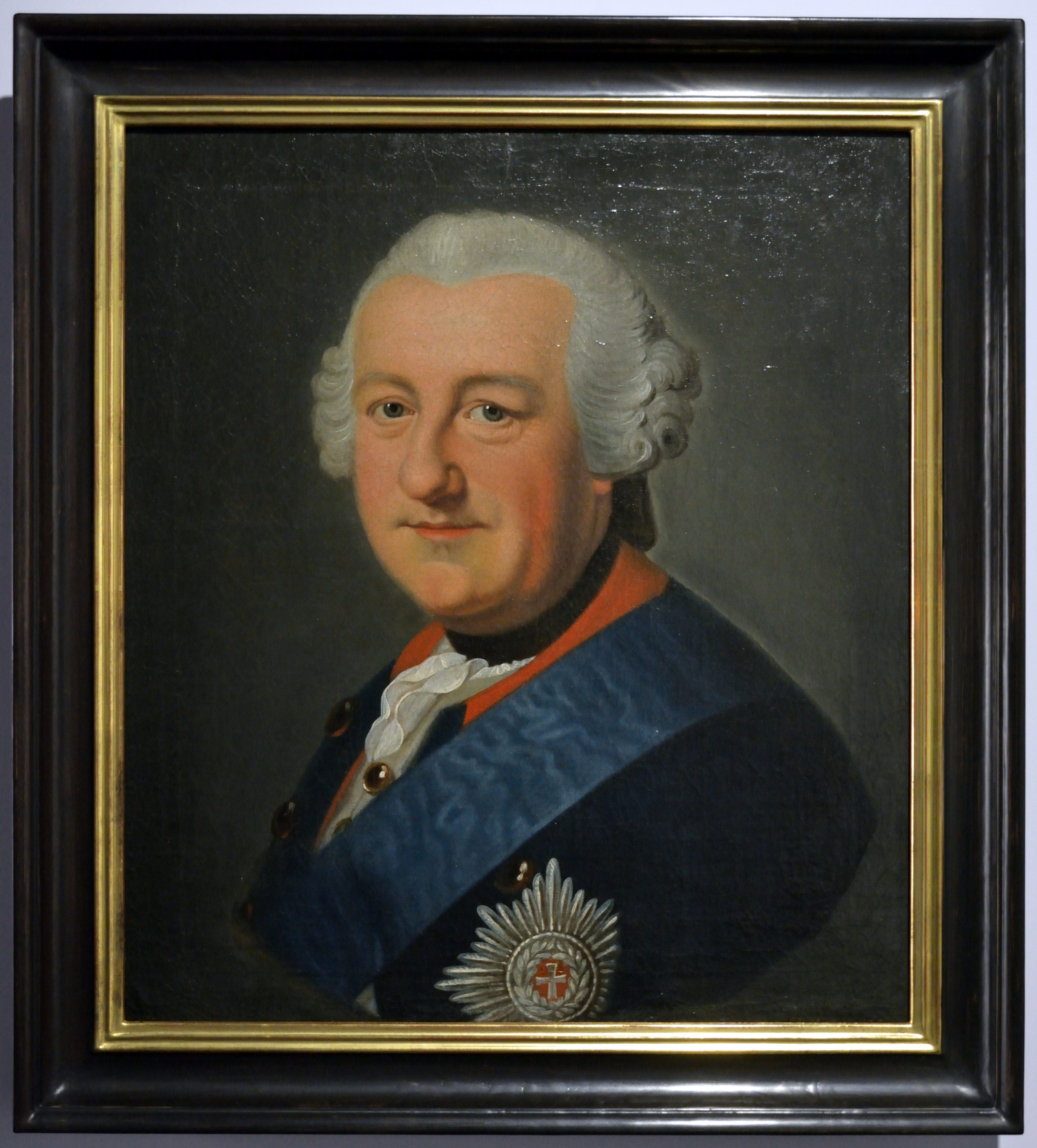 Bild von Karl I. (1713-1780)